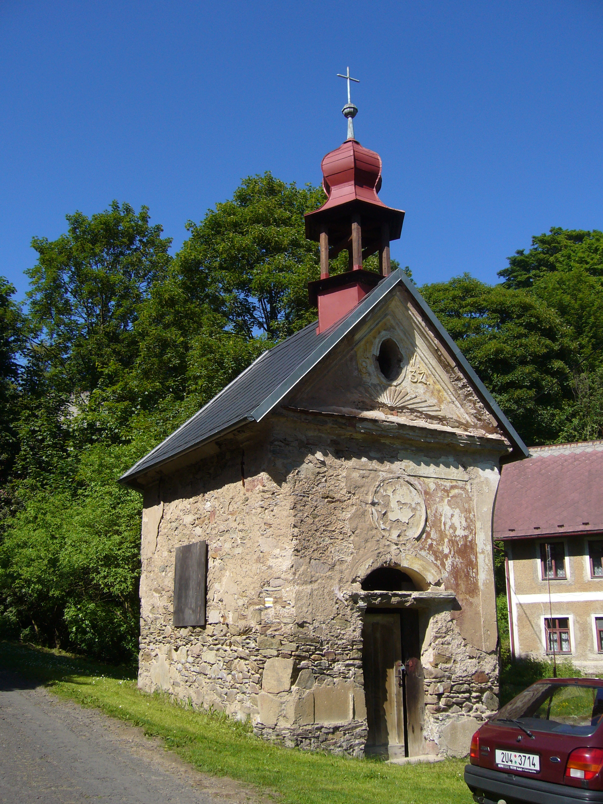 Rájov - kaple Trpícího Krista Spasitele z roku 1832